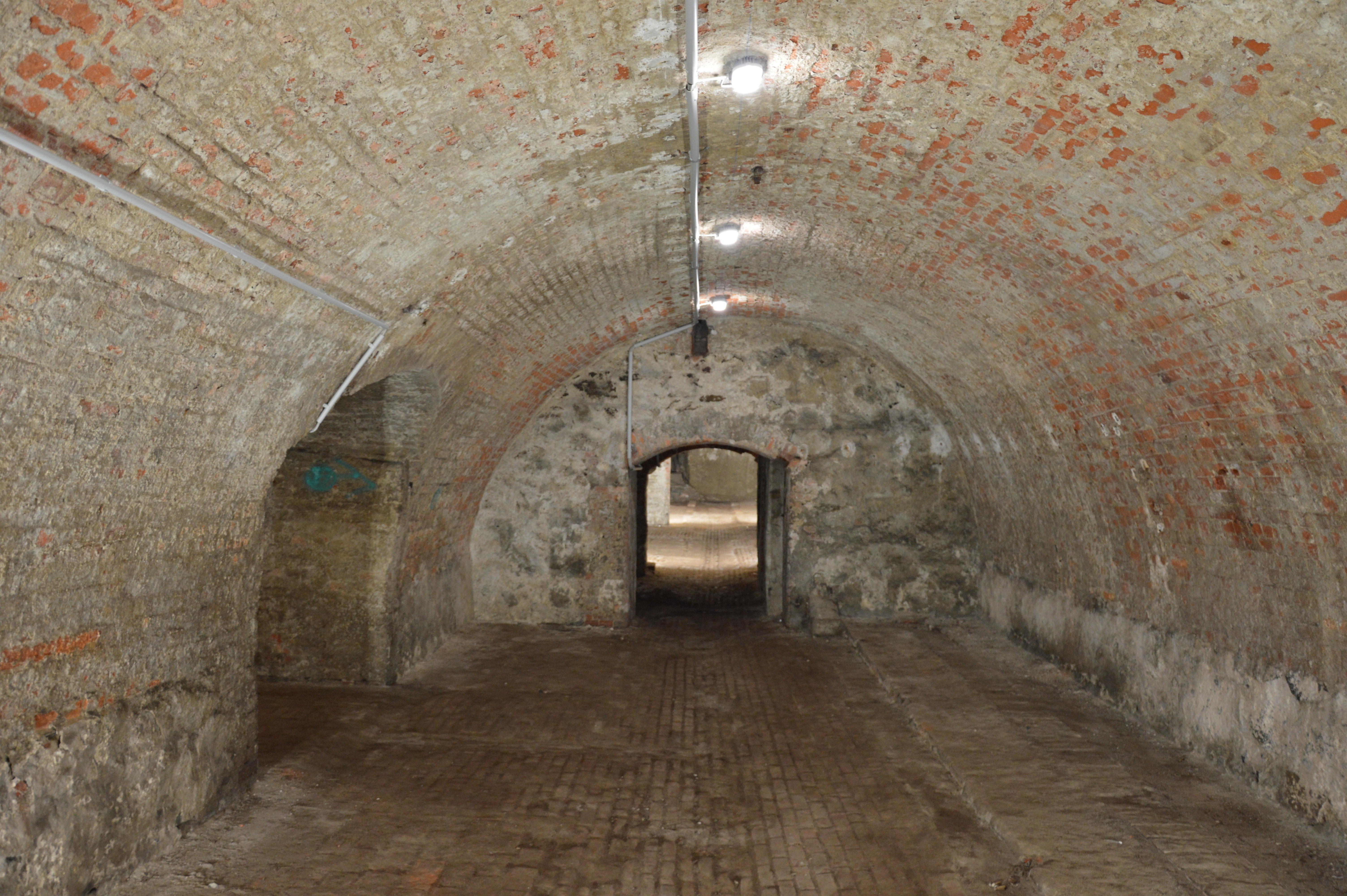 Eiskeller Weinberg Burg